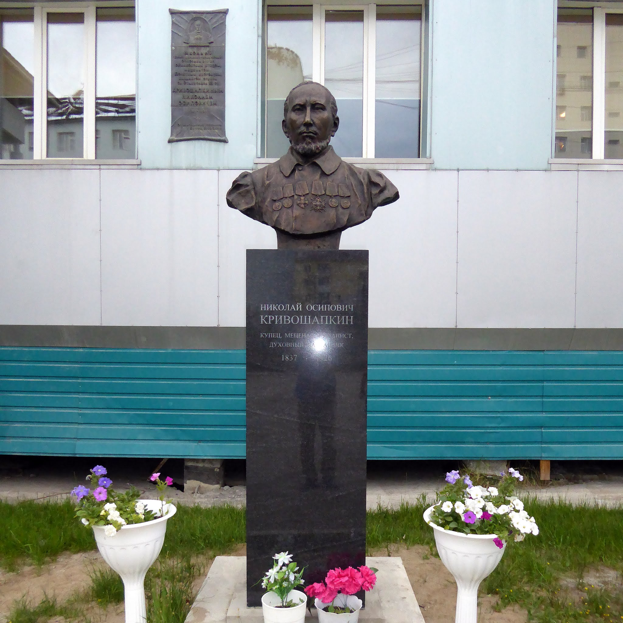 Средняя школа № 5, Якутск